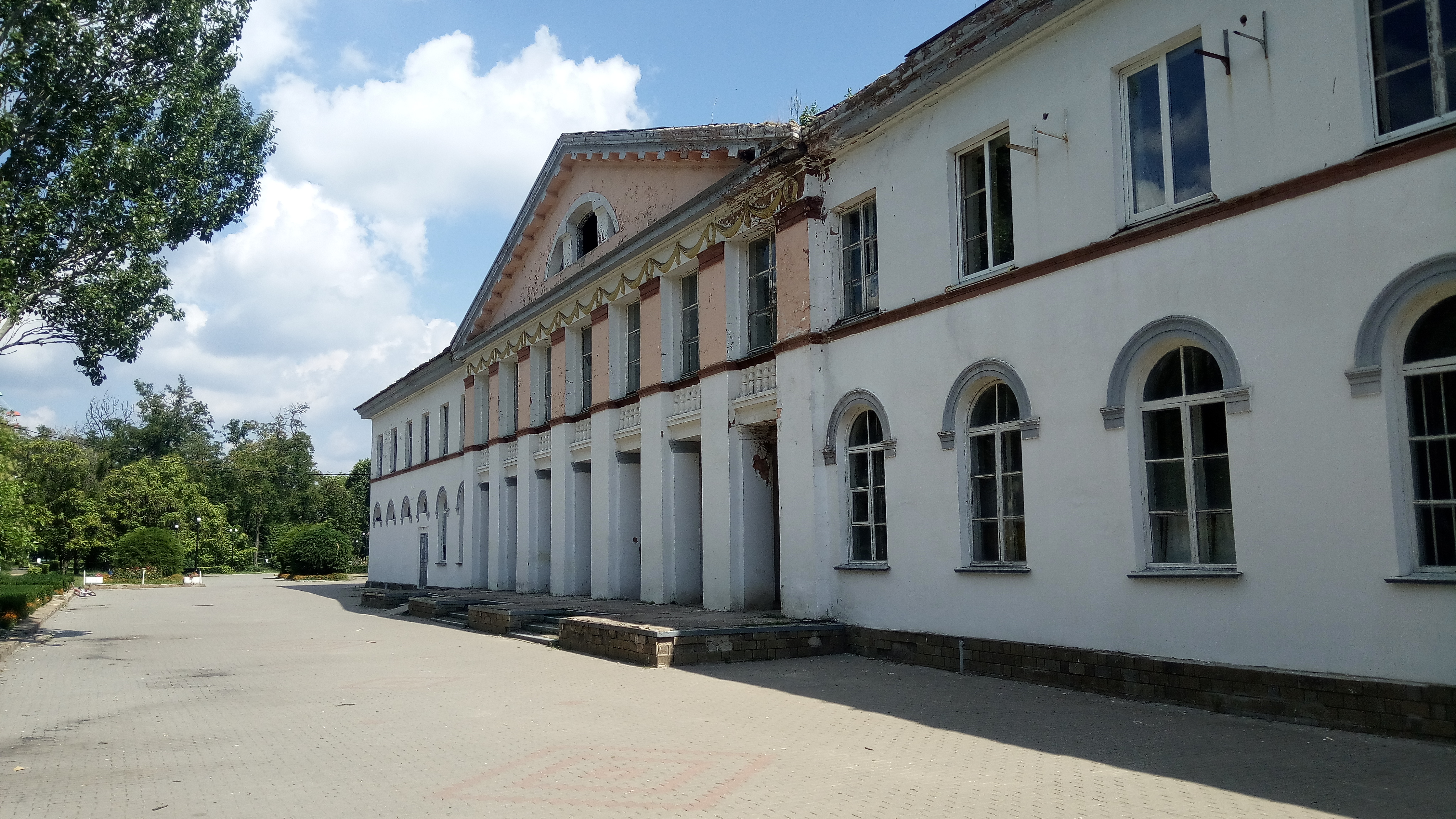 ДК шахтёров (Донецк РФ)